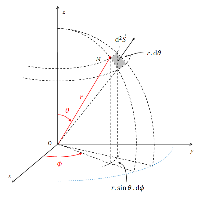 Description des notations utilisées en coordonnées sphériques